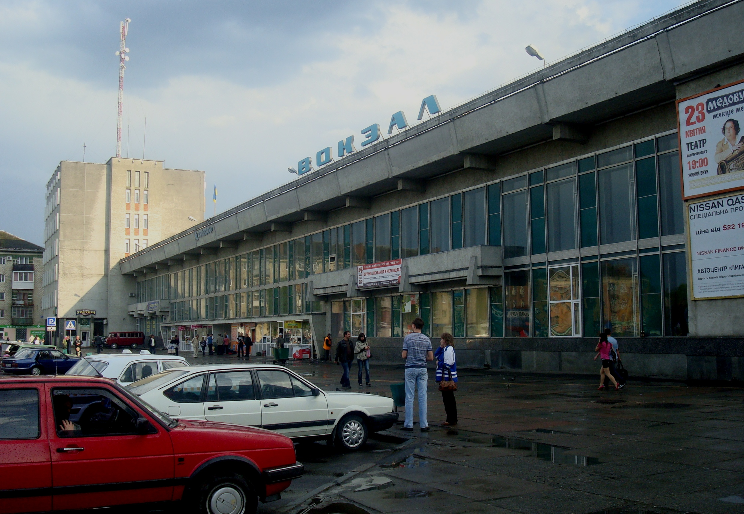 Вокзал в городе Хмельницкий